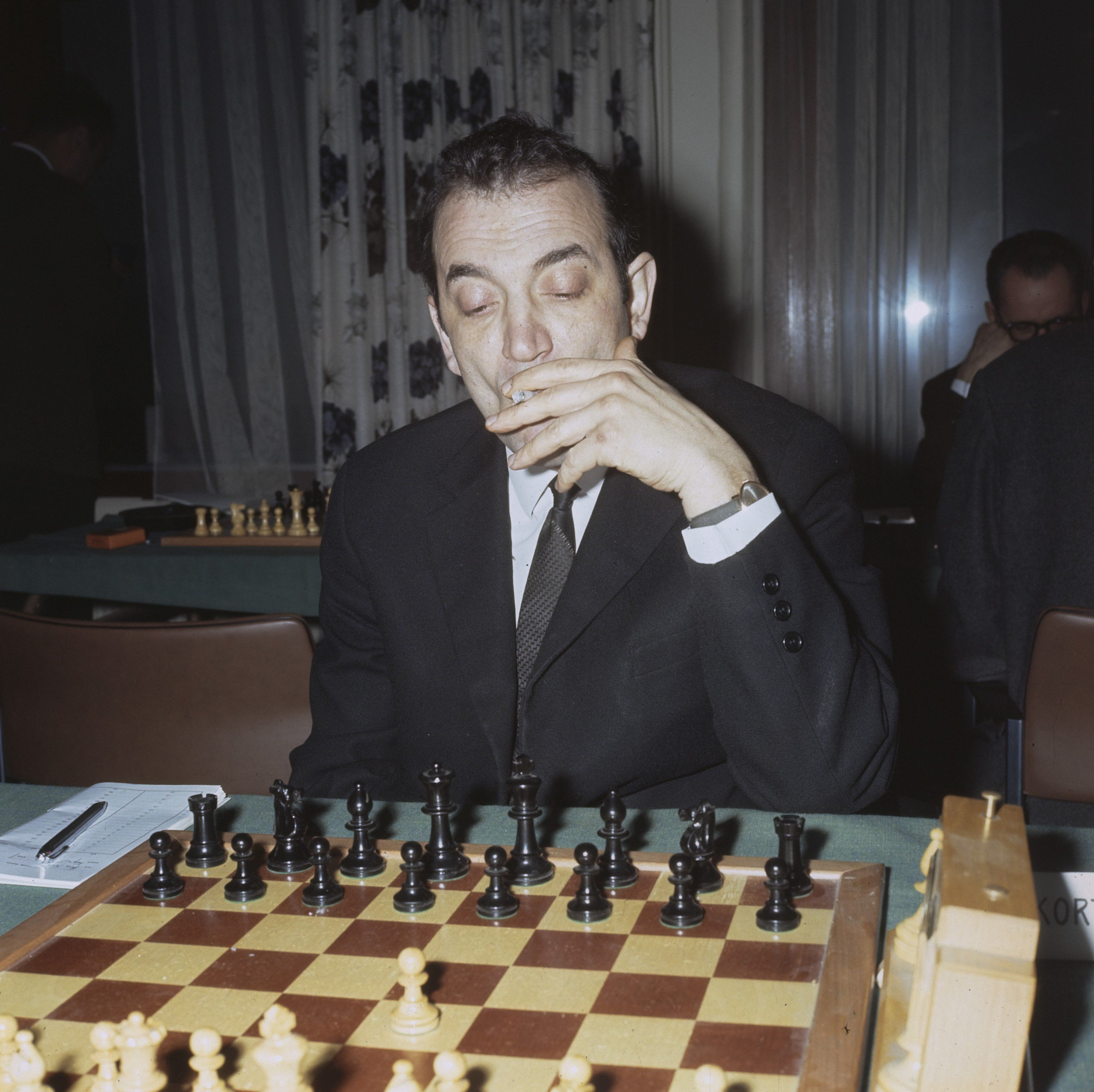 Collectie / Archief : Fotocollectie Anefo Reportage / Serie : [ onbekend ] Beschrijving : Hoogovenschaaktoernooi te Beverwijk; Kortsnoj, USSR Datum : 5 januari 1968 Locatie : Beverwijk Trefwoorden : schaken Persoonsnaam : Kortsjnoi, Viktor Instellingsnaam : Hoogovenschaaktoernooi Fotograaf : Koch, Eric / Anefo Auteursrechthebbende : Nationaal Archief Materiaalsoort : Dia (kleur) Nummer archiefinventaris : bekijk toegang 2.24.01.07 Bestanddeelnummer : 254-7968